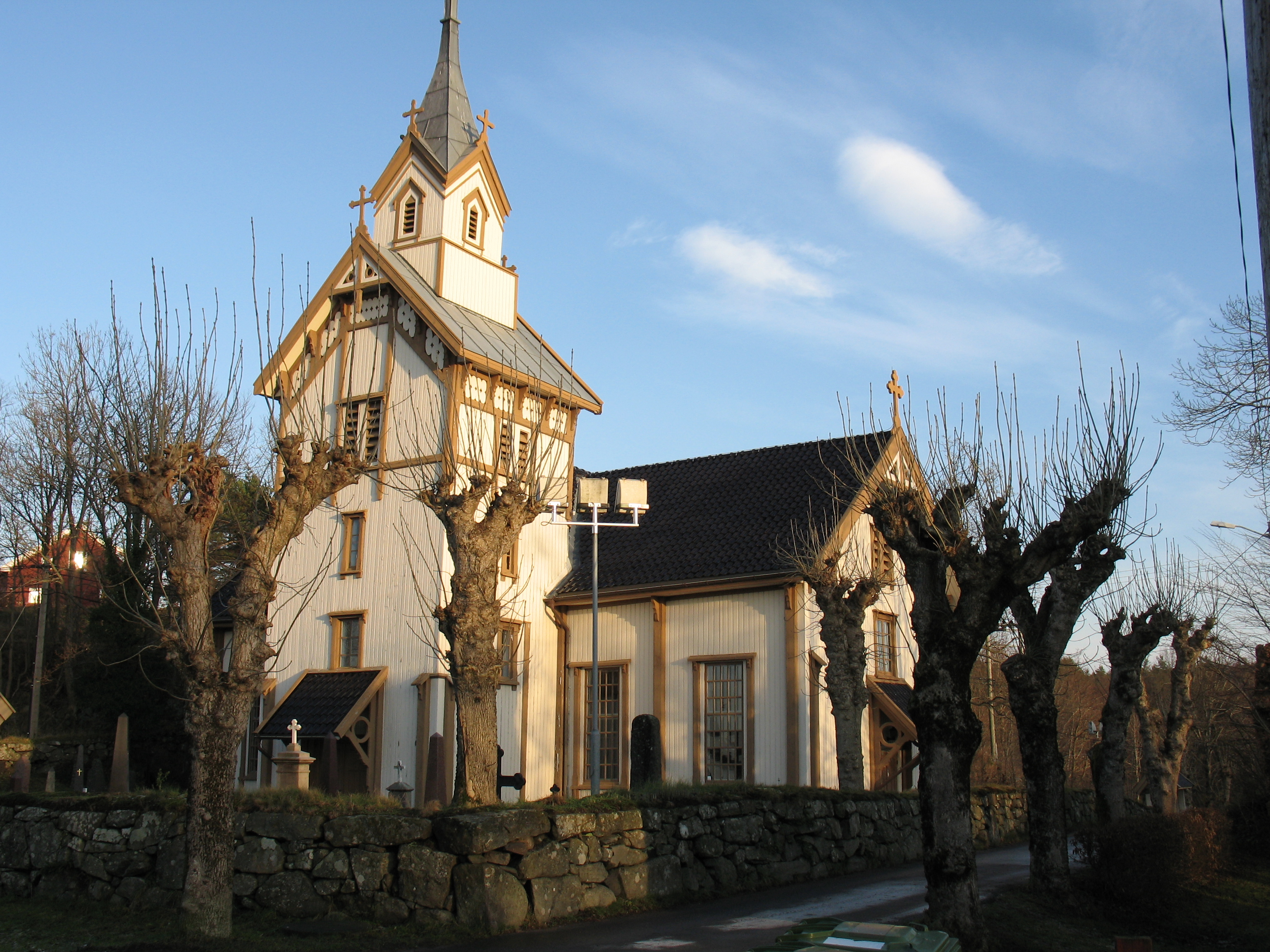 Flosta kirke, Arendal. 2006. Author:Karl Ragnar Gjertsen.